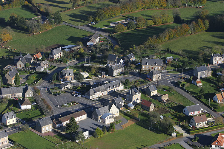 Saint-Barthélemy vu du ciel. Manche, Normandie, France.